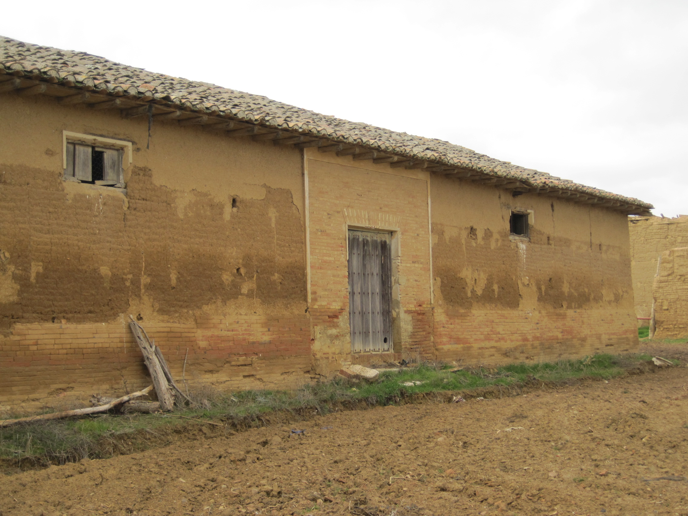 Construcción tradicional en San Román de la Cuba (Palencia, España).